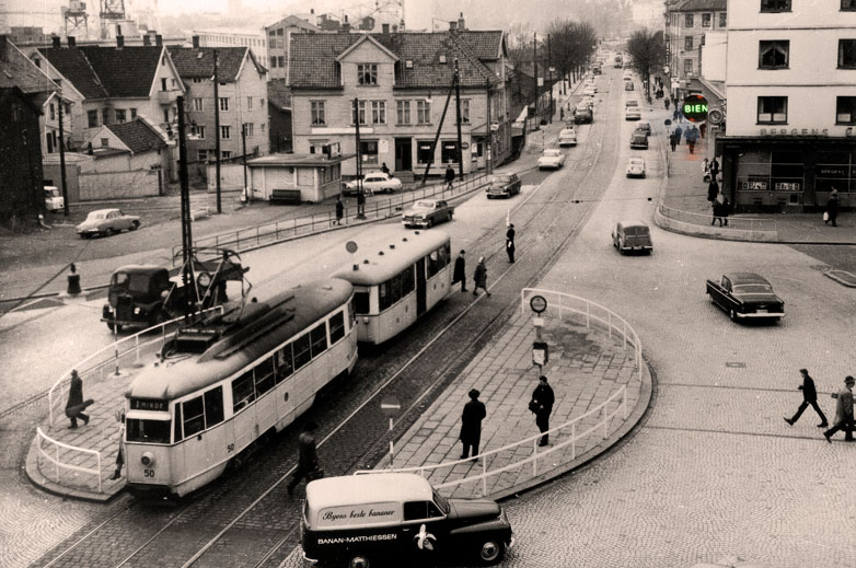 Danmarksplass i gamle dager.